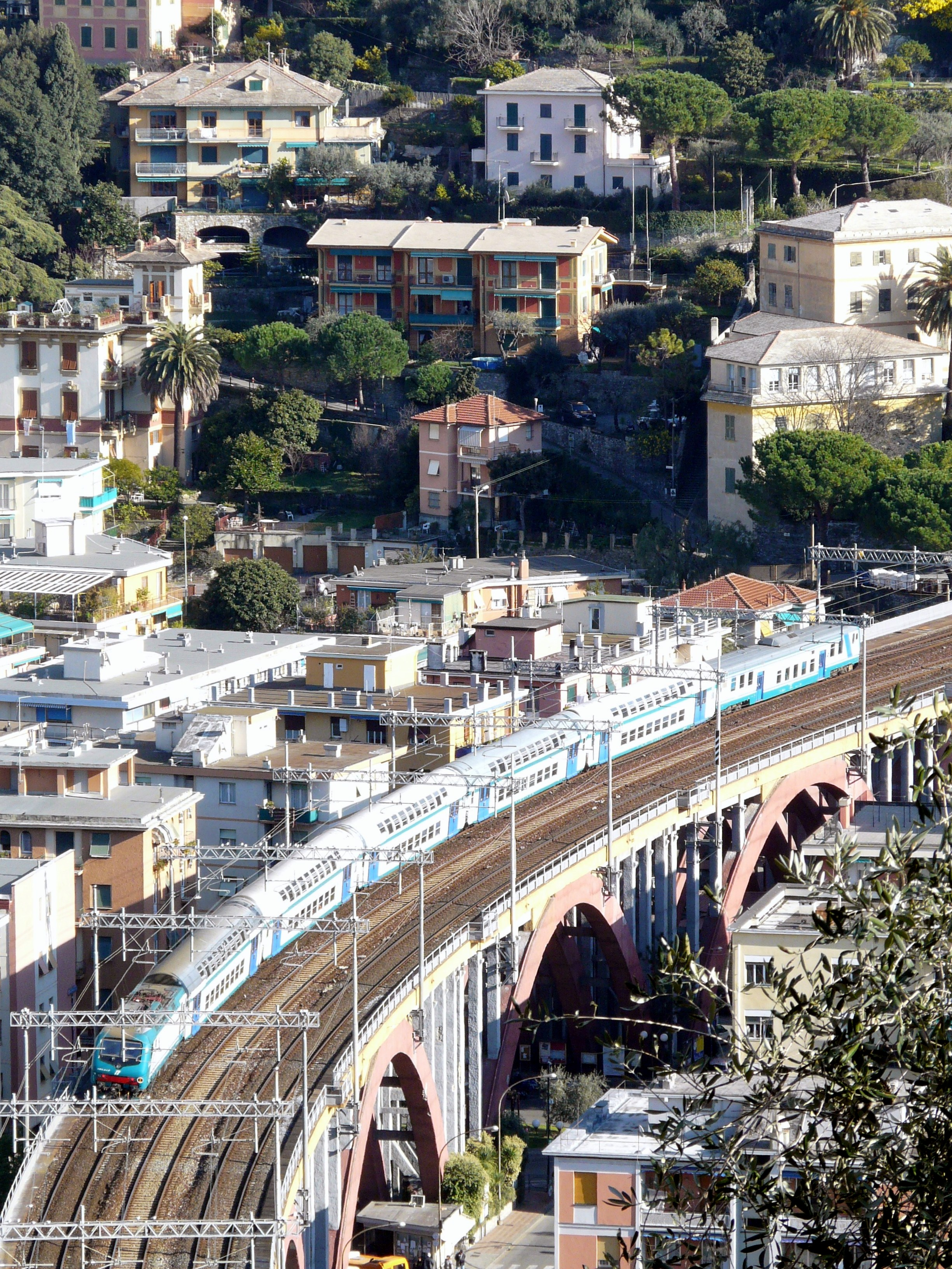 Un treno in sosta presso il ponte ferroviario di Recco. Panorama dal santuario di Nostra Signora delle Grazie di Megli, Recco, Liguria, Italia